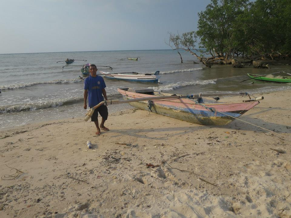 Im Dorf Biacou, Suco Aidabaleten